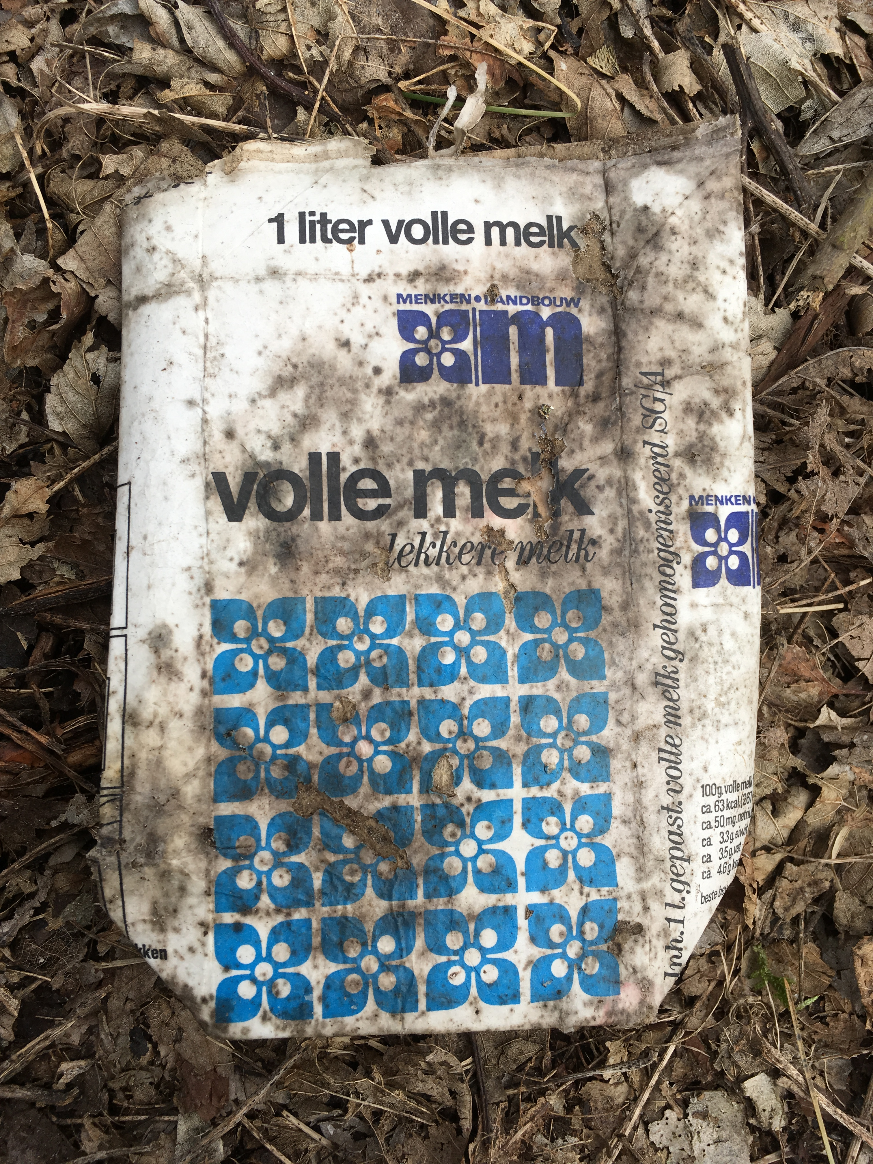 Gebruikte verpakking van 1 liter volle melk van Menken Landbouw. Gevonden in de Amsterdamse Waterleidingduinen bij een bunker van Complex R (Rozenwaterveld).